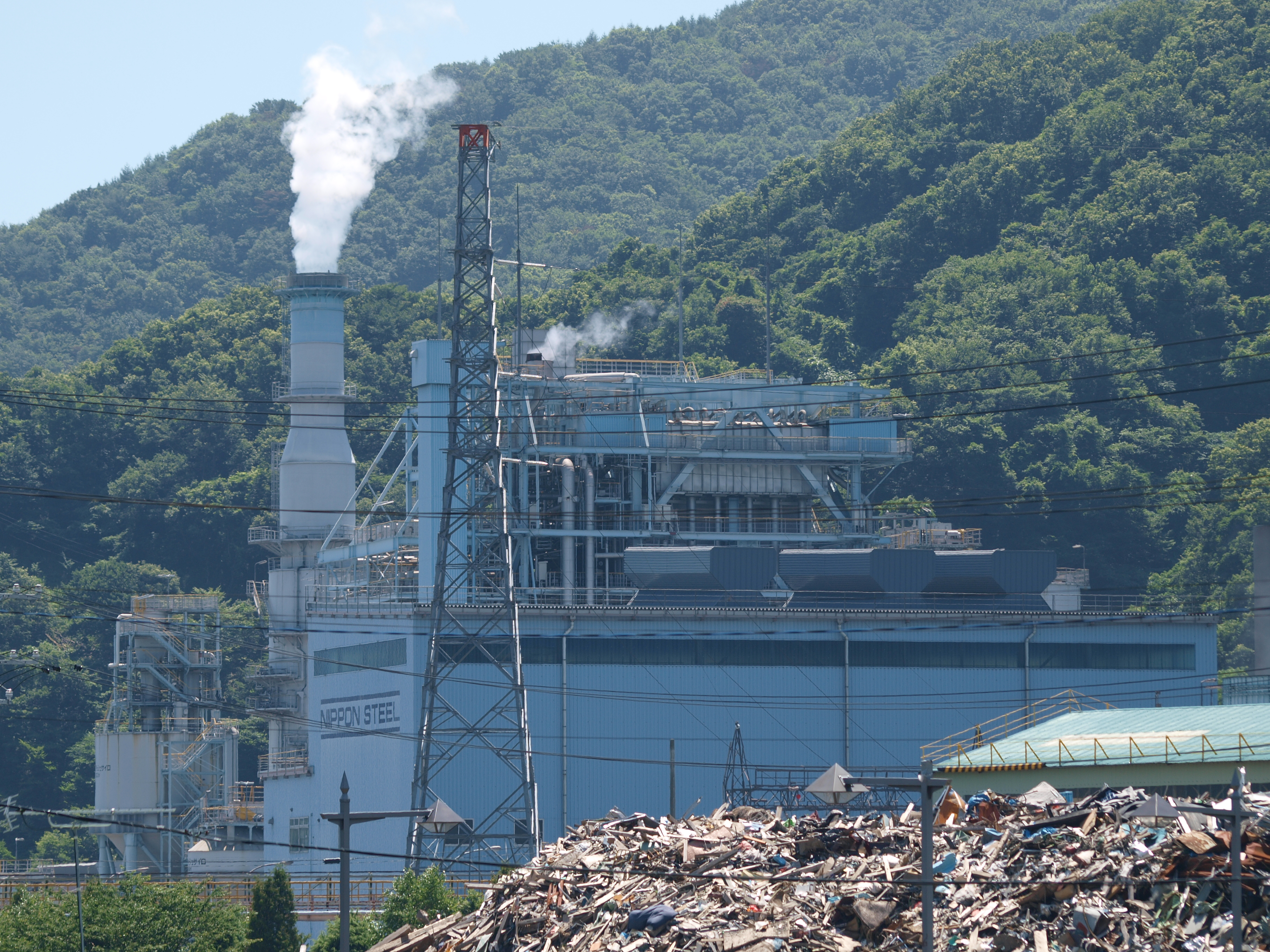 Kamaishi , Iwate